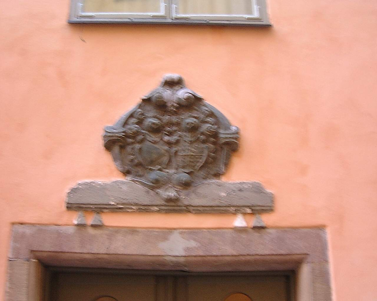 Sign at 6-8, Österlånggatan, Gamla stan, Stockholm.